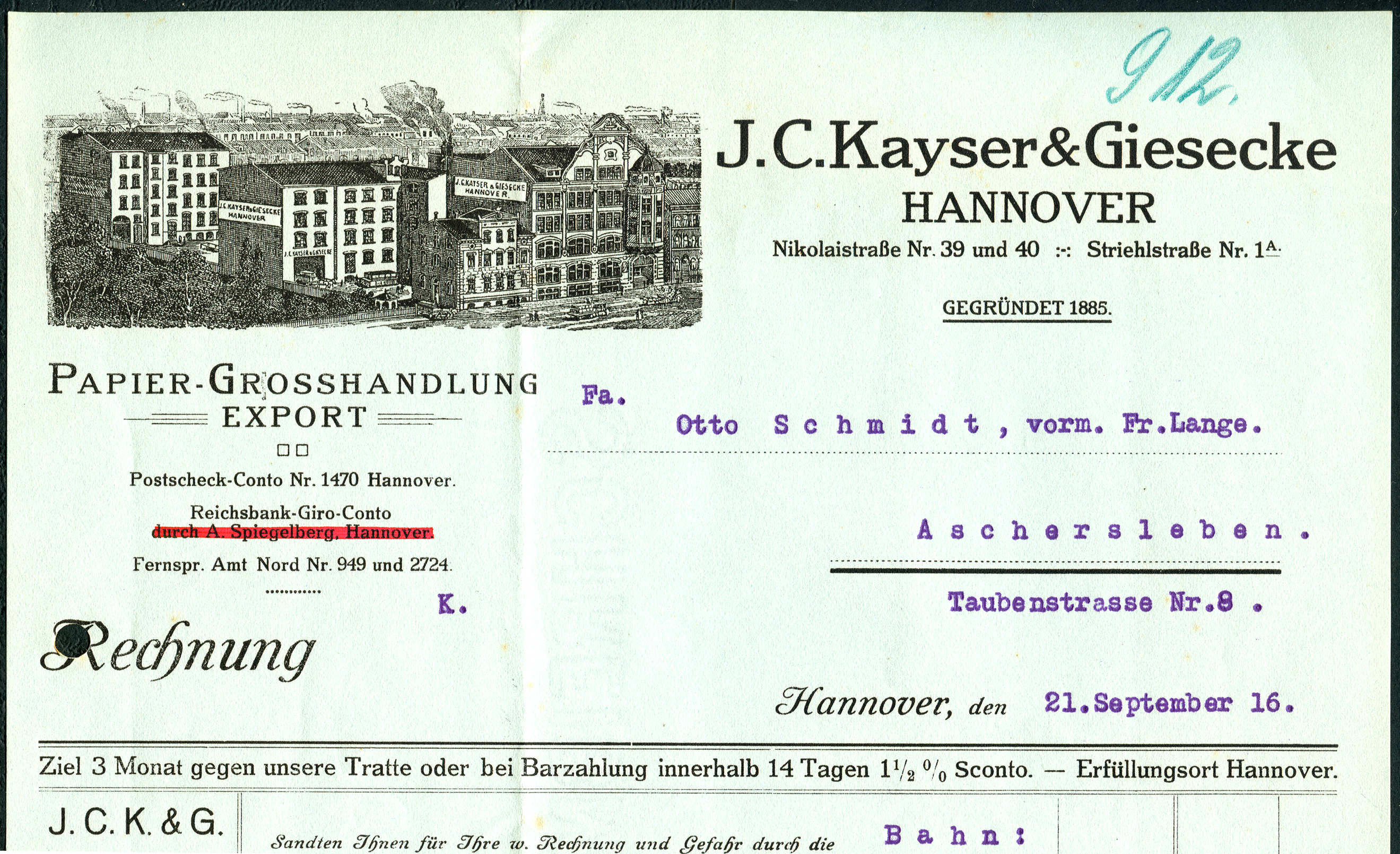 Kopf einer Rechnung der Firma J. C. Kayser & Giesecke in Hannover mit einer Vogelschau-Ansicht der Fabrikations-Anlagen in der Nikolaistraße 39 und 40 sowie der Striehlstraße 1A. Die Papier-Großhandlung exportierte ihre Waren auch; diese Rechnung wurde jedoch nur bis zu Herrn Otto Schmidt, vormals Friedrich Lange, in Aschersleben, Taubenstraße 8 befördert. Das Bankkonto des Absender im Bankhaus A. Spiegelberg sollte 1916, mitten im Ersten Weltkrieg, offenbar nicht mehr bedient werden ...